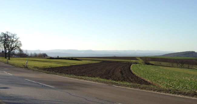 Panorama in Richtung Alb bei Thomashardt